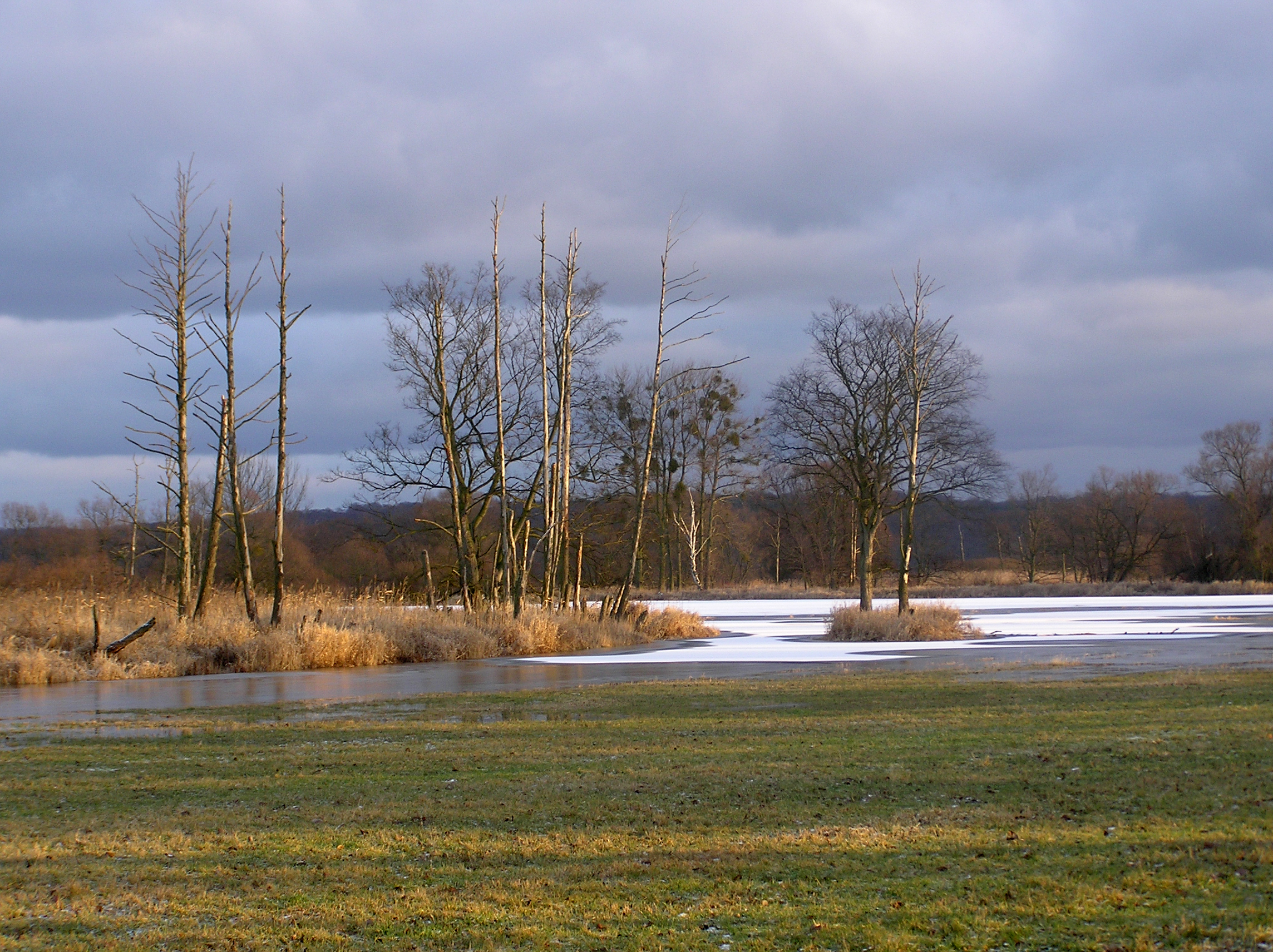 Wiesen bei Gatow im Nationalpark Unteres Odertal